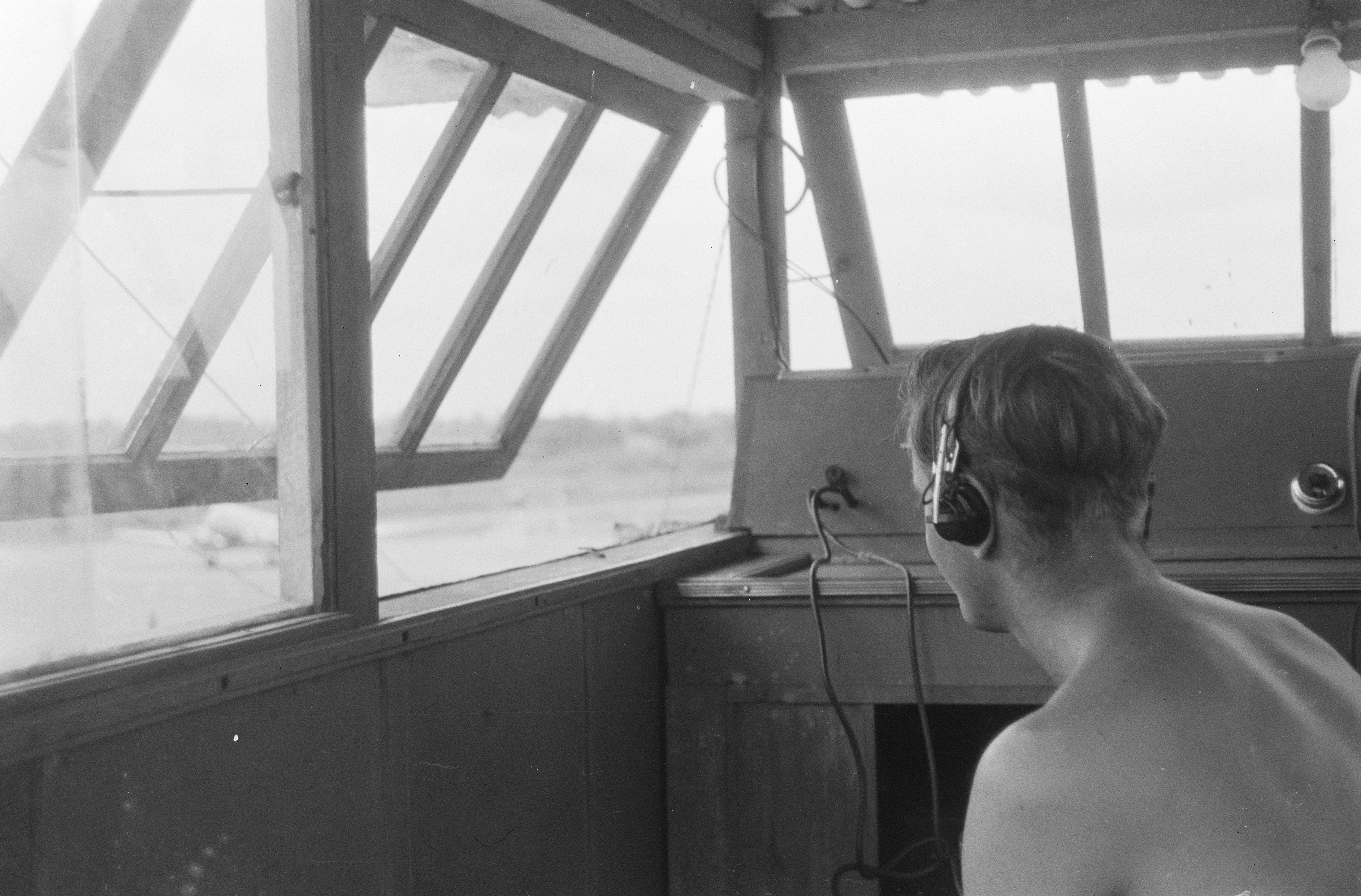 Collectie / Archief : Fotocollectie Dienst voor Legercontacten Indonesië Reportage / Serie : [DLC] Vliegveld Maospati Madioen Beschrijving : Verkeersleider in verkeerstoren Datum : 19 april 1949 Locatie : Indonesië, Nederlands-Indië Fotograaf : Kellenbach, F.C. / DLC Auteursrechthebbende : Nationaal Archief Materiaalsoort : Negatief (zwart/wit) Nummer archiefinventaris : bekijk toegang 2.24.04.02 Bestanddeelnummer : 378